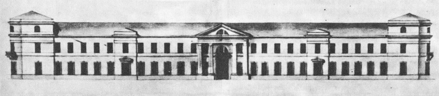 Беларуская (тарашкевіца): Менск (Miensk), Высокі Рынак (Vysoki Rynak). Гасьціны двор